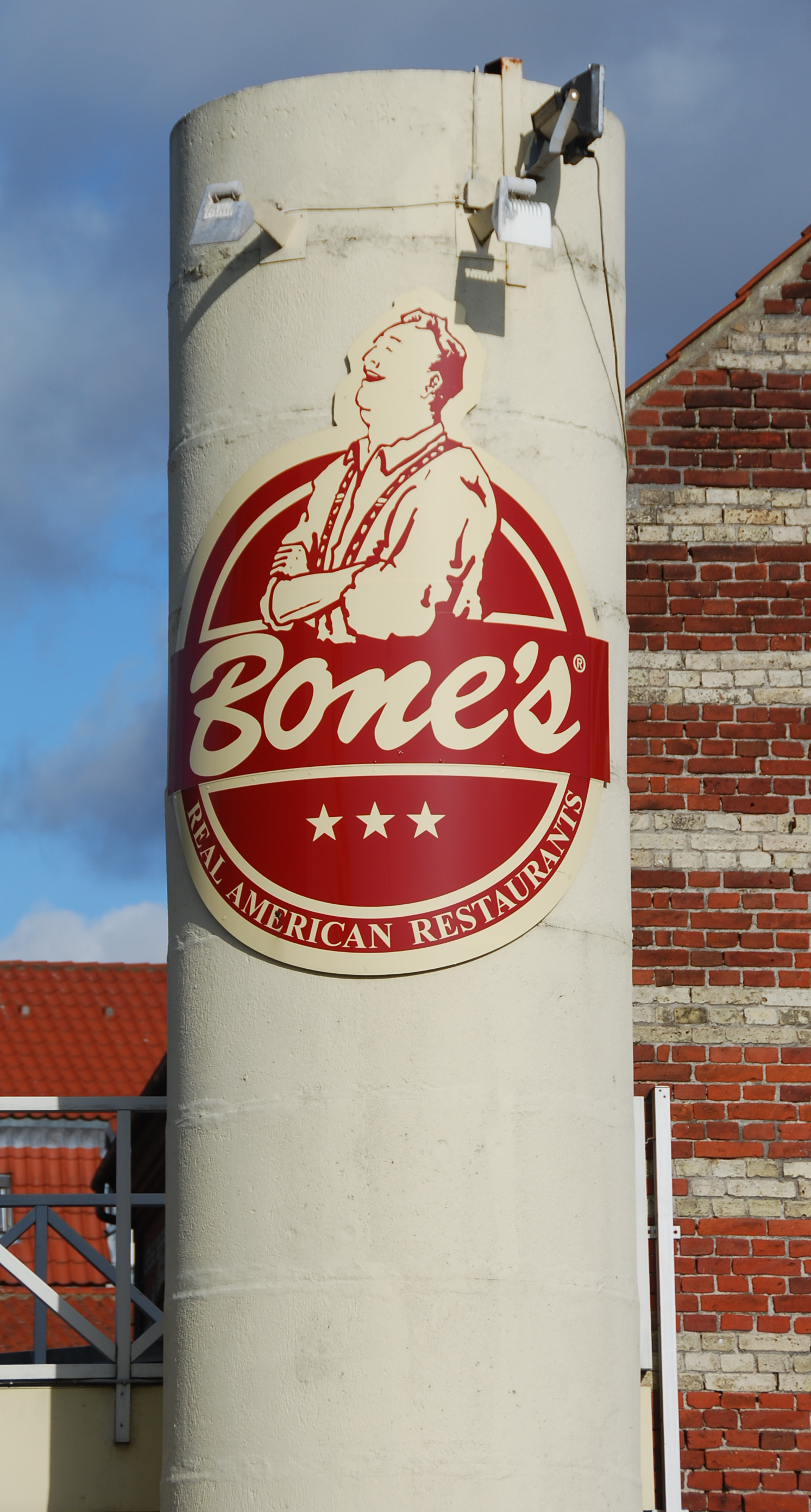 Indgangen til Bone's restaurant i Viborg.